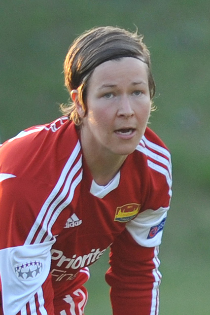 UEFA Women's Champions League 2013/14 SV Neulengbach - Tyresö FF Neulengbach, 29. März 2014 Tinja-Riikka Korpela